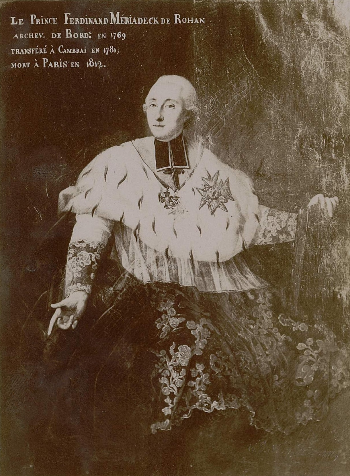 Le Prince Ferdinand Mériadeck de Rohan, archevêque de Bordeaux en 1769, transféré à Cambrai en 1781, mort à Paris en 1812.